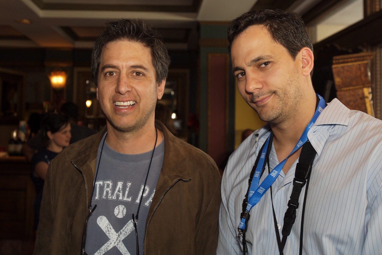 ray romano, tom caltabiano